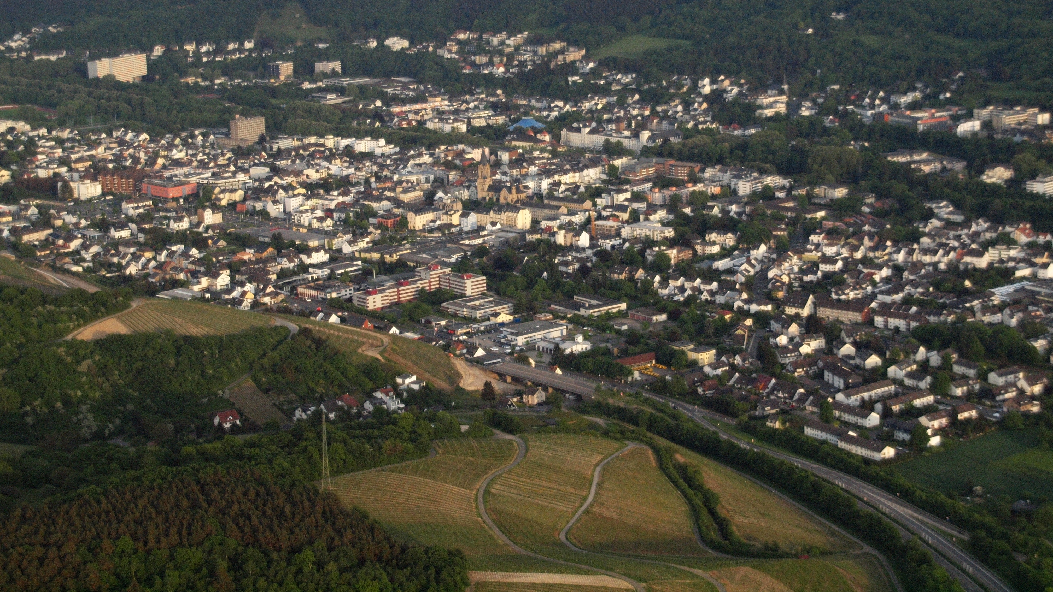 Bad Neuenahr, Luftaufnahme (2015)